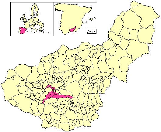 Situación de la Mancomunidad de Municipios de la Vega Alta respecto a la provincia de Granada, en España.